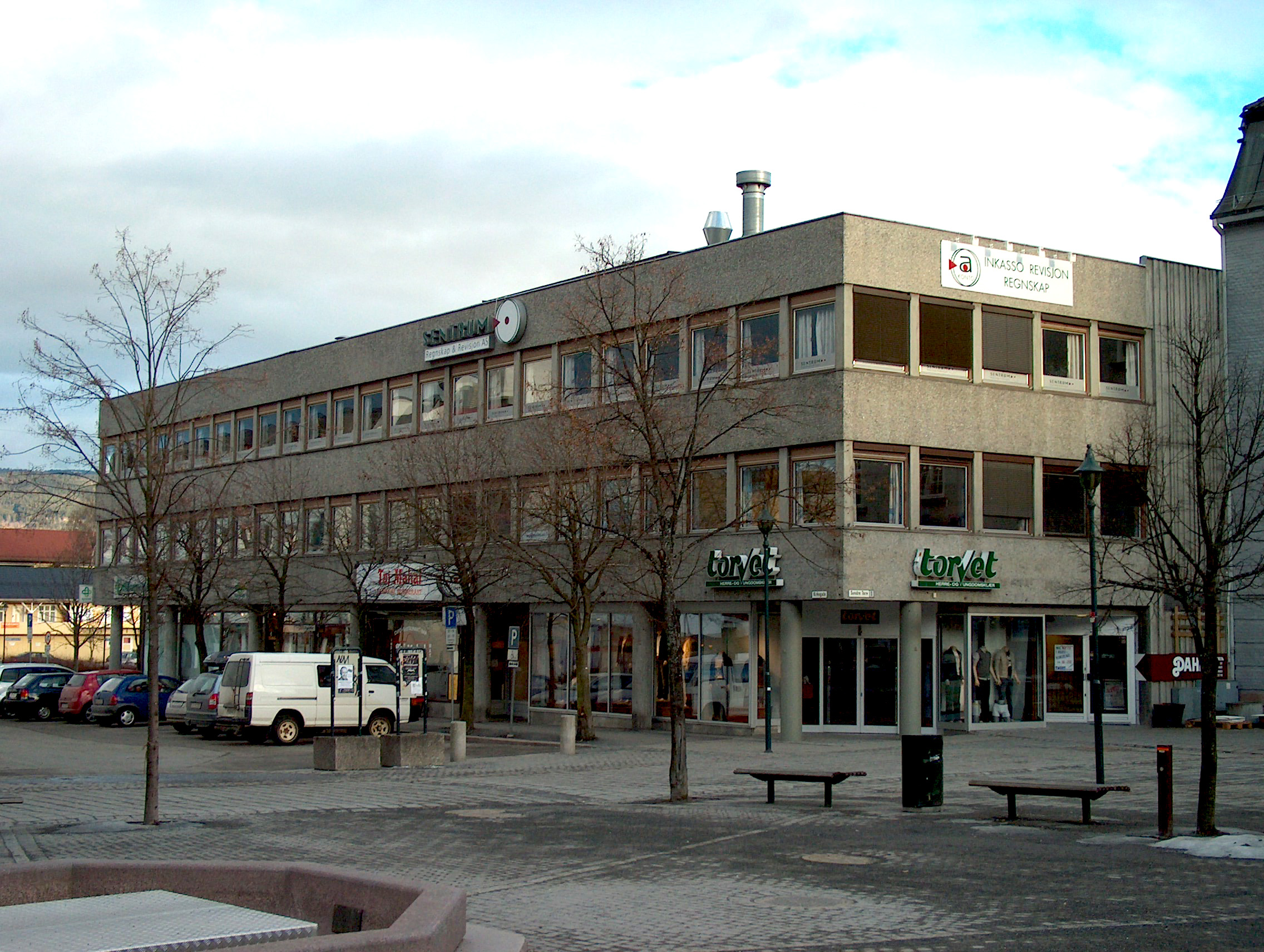 Thoresengården i Hønefoss (Norway)